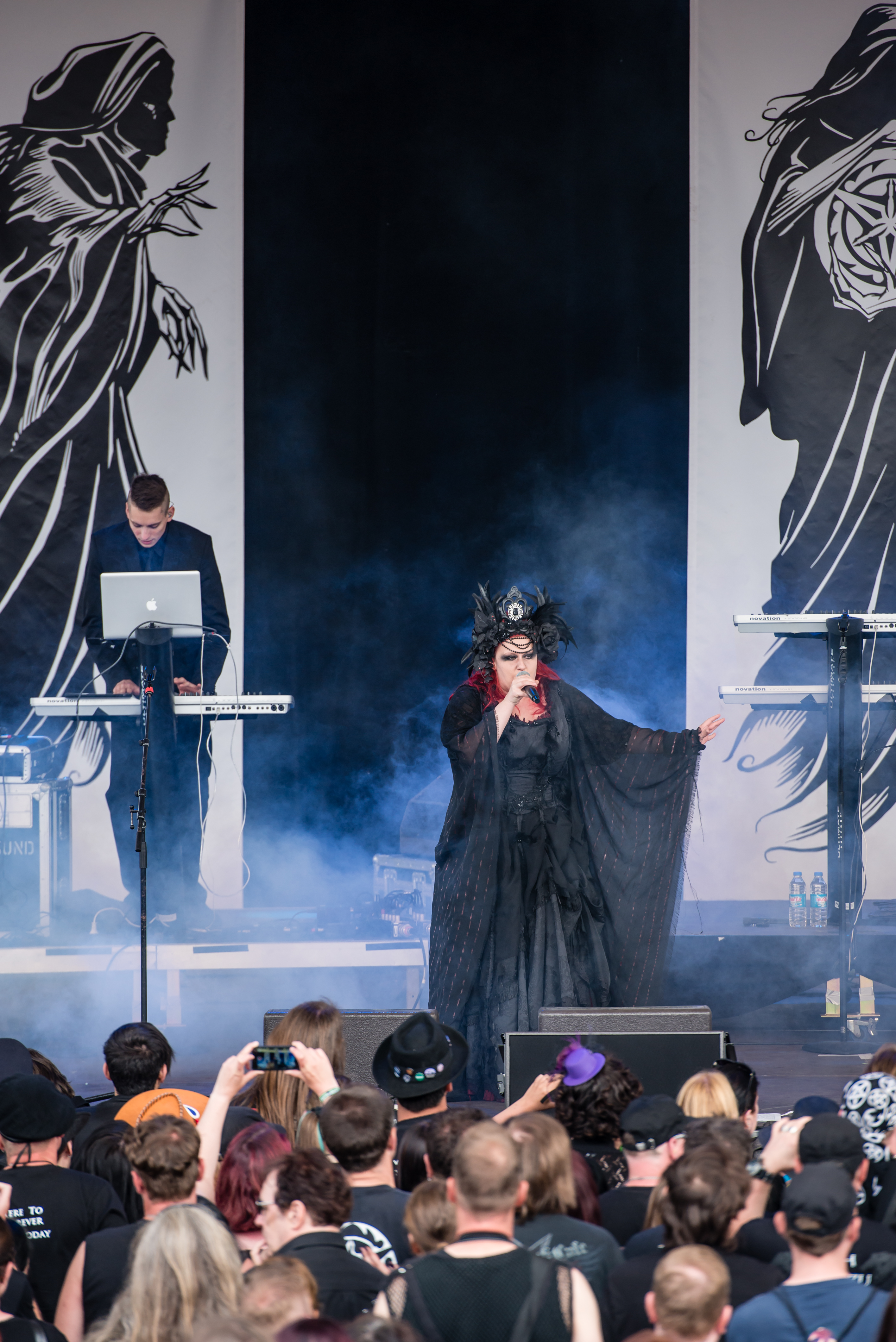 'Blackfield Festival 2015; Gelsenkirchen Amphitheater': 'L'amme Immortelle'